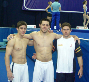 De izquierda a derecha, los gimnastas Javier Gómez, Iván San Miguel e Isaac Botella, en la Copa del Mundo de Moscú 2006